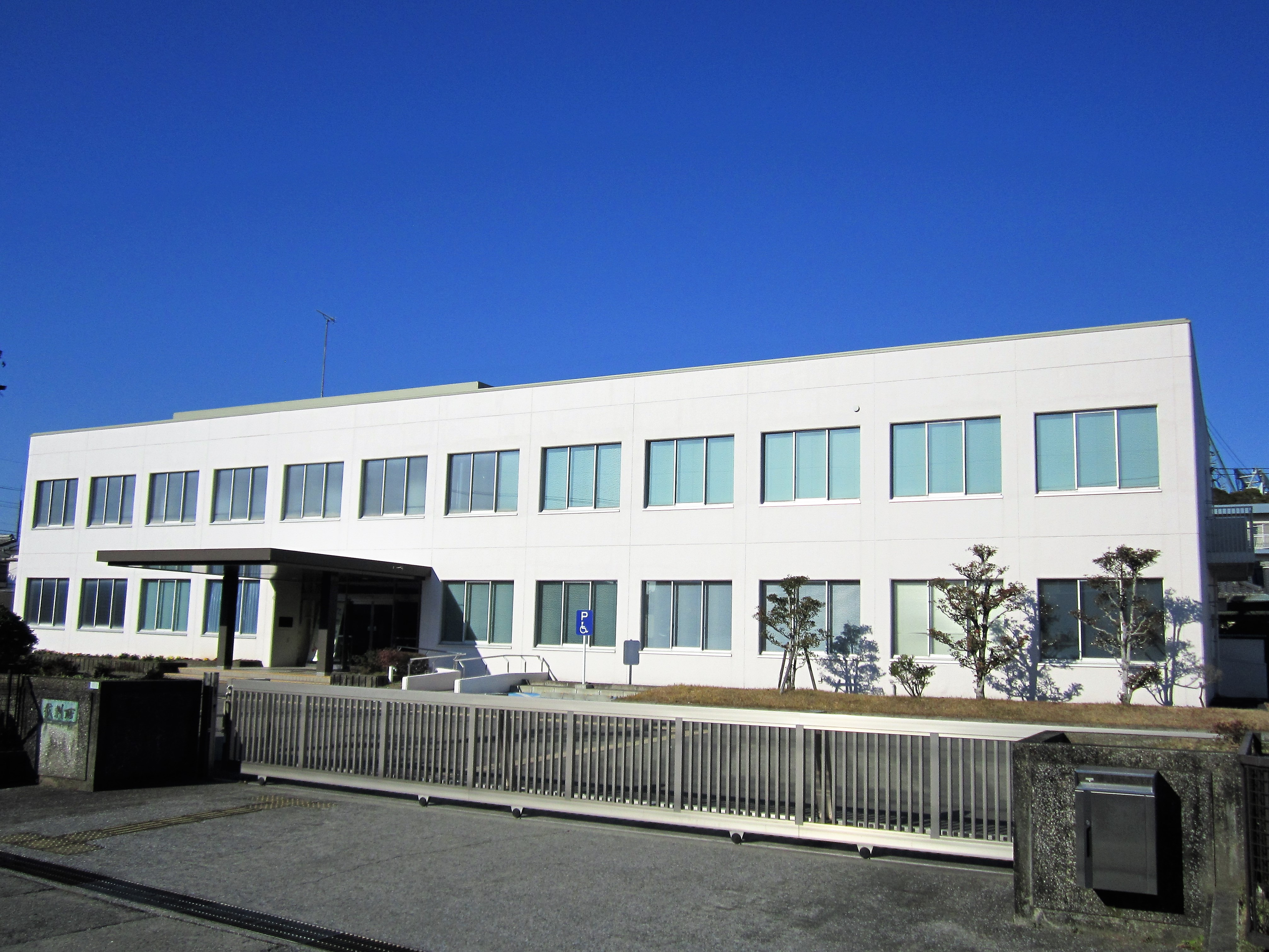 大分地方裁判所佐伯支部・大分家庭裁判所佐伯支部・佐伯簡易裁判所 Canon PowerShot A2200